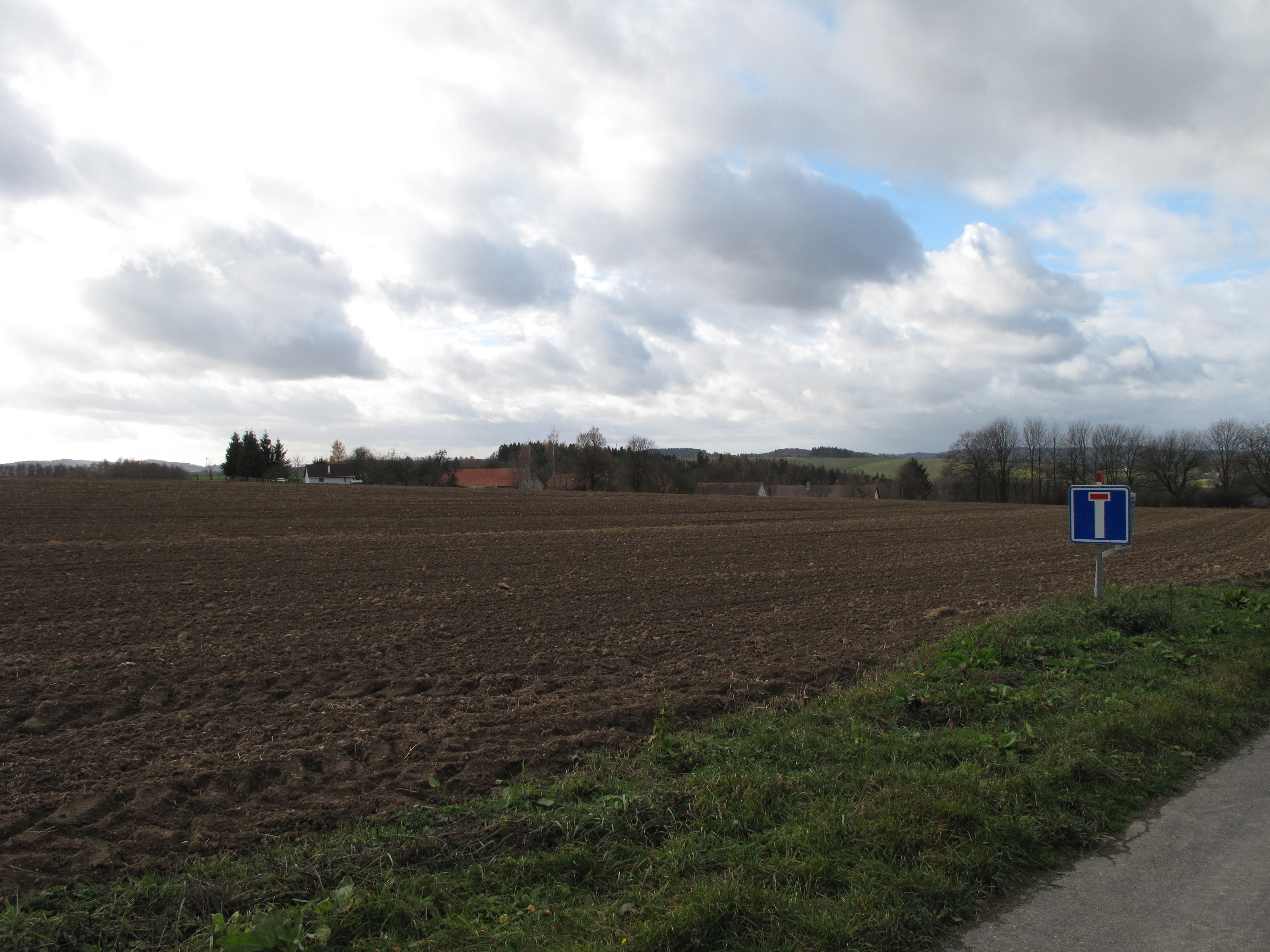 Pohled na Vestec. Okres Benešov, Česká republika.